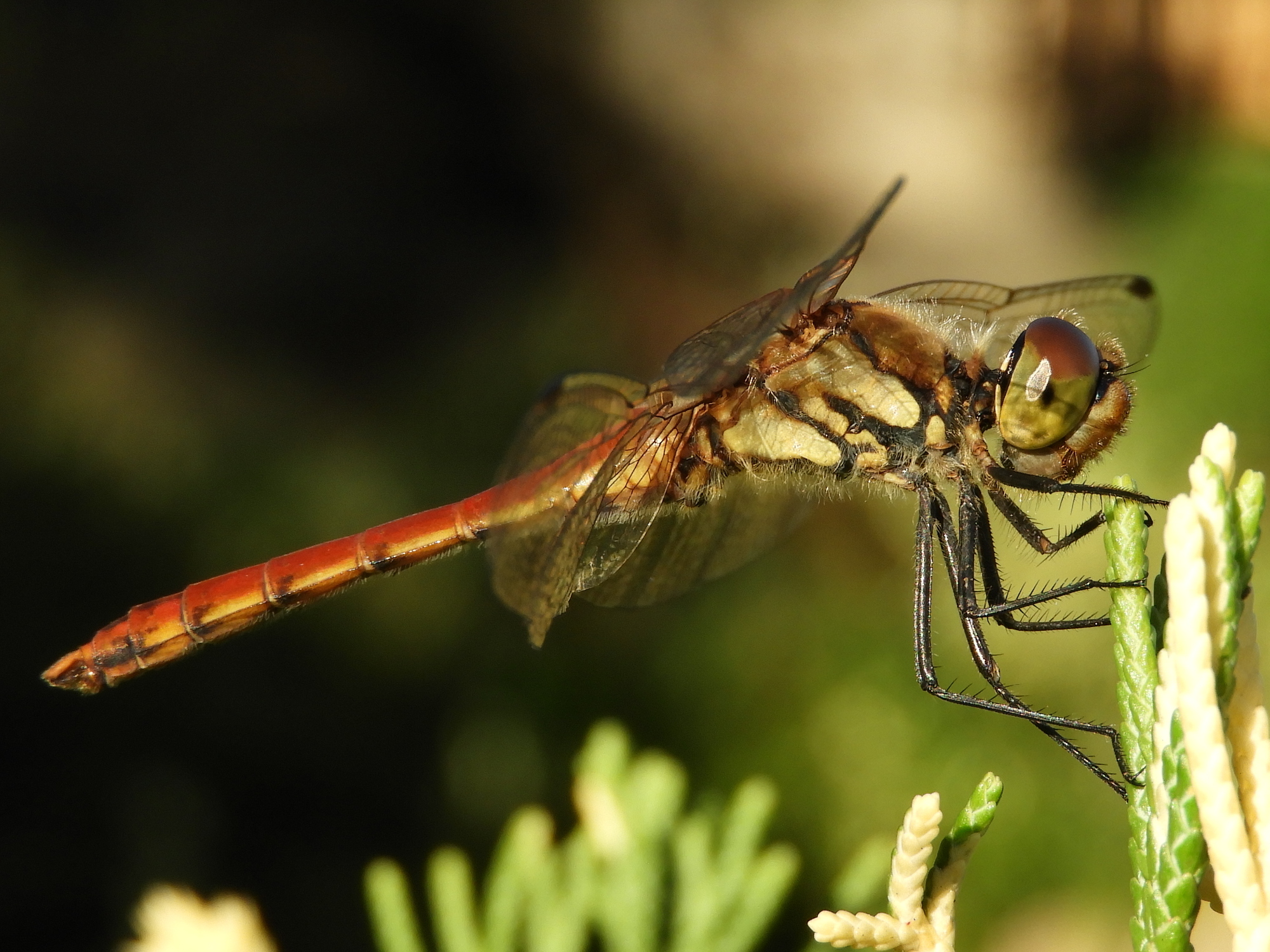 アキアカネ雄 広島県